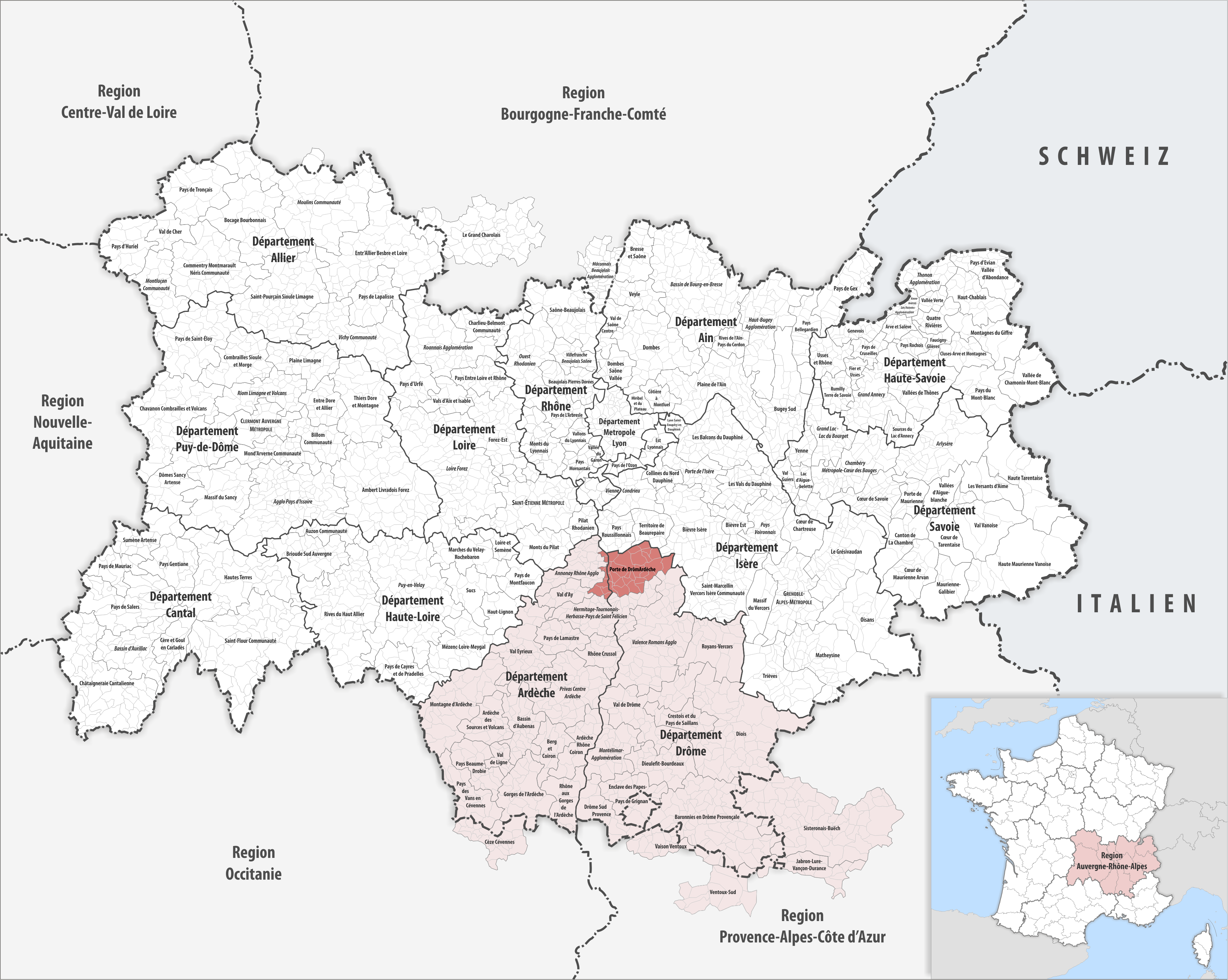 Lage des Gemeindeverbandes Porte de DrômArdèche